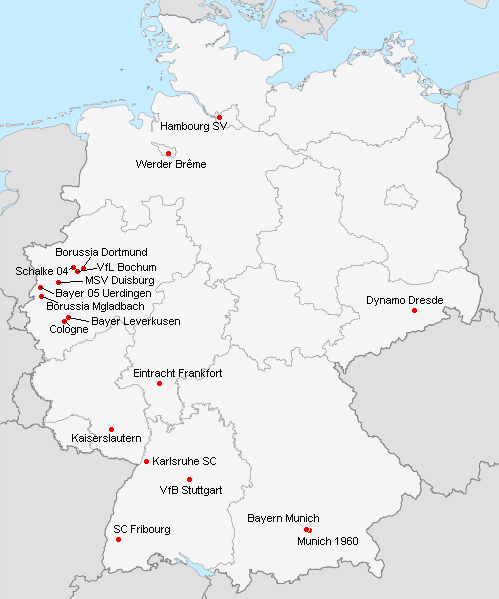 Répartition des clubs en 1.Bundesliga 1994-1995.